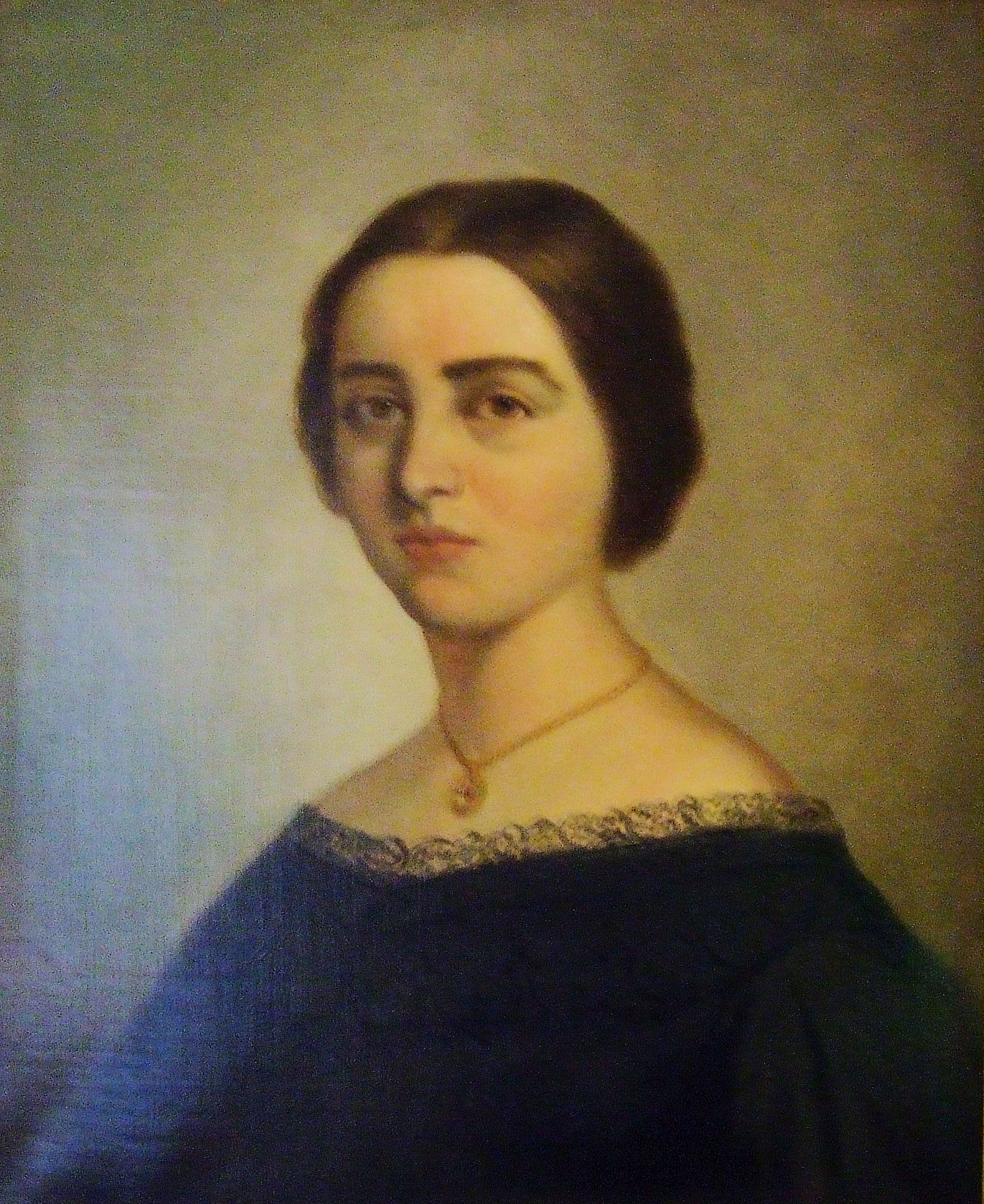 Szendrey Júlia portréja. Ismeretlen művész festménye Barabás Miklós litográfiája alapján. Petőfi Szülőház és Emlékmúzeum, Kiskőrös